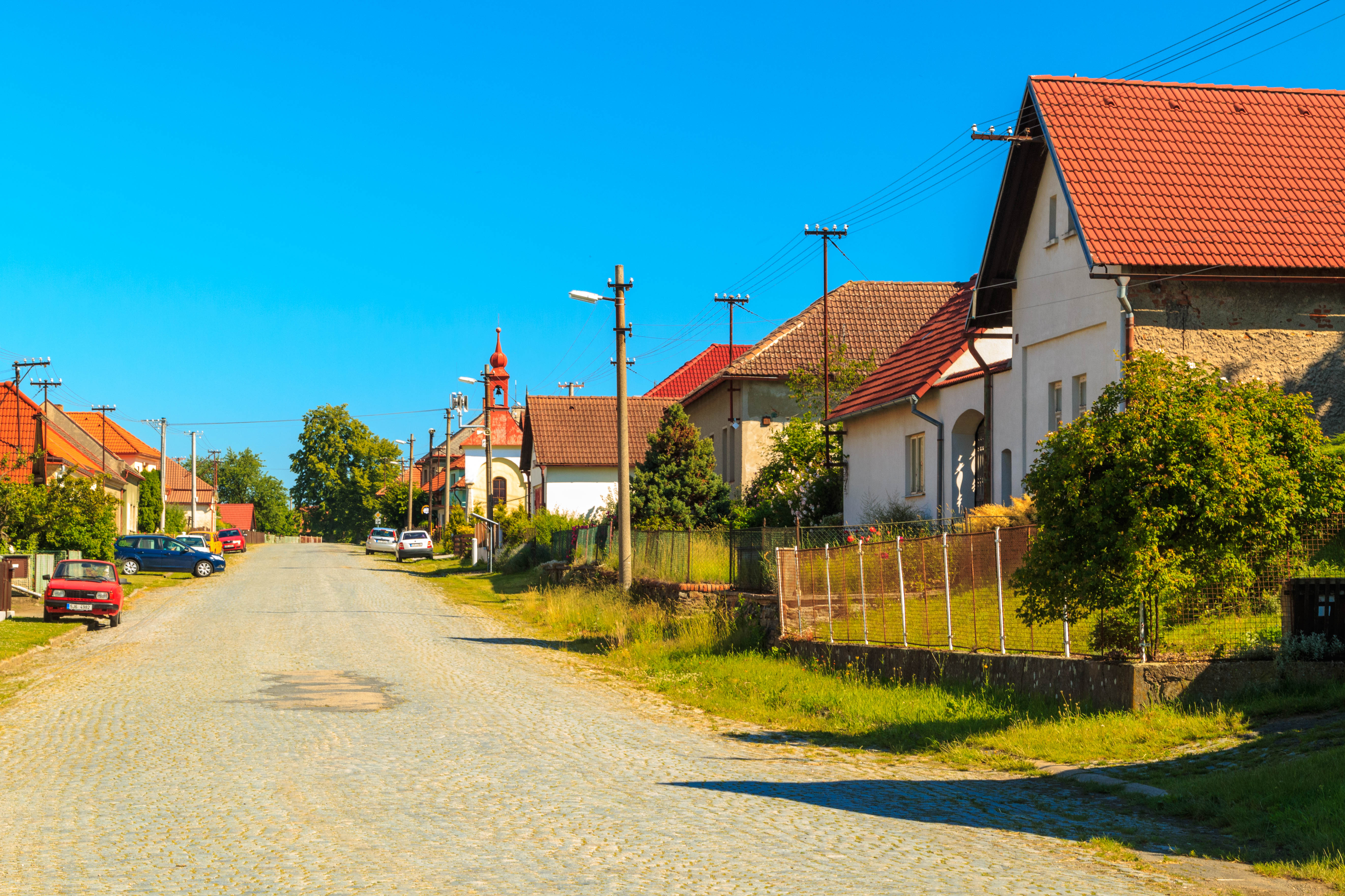 Frýdnava čp. 68